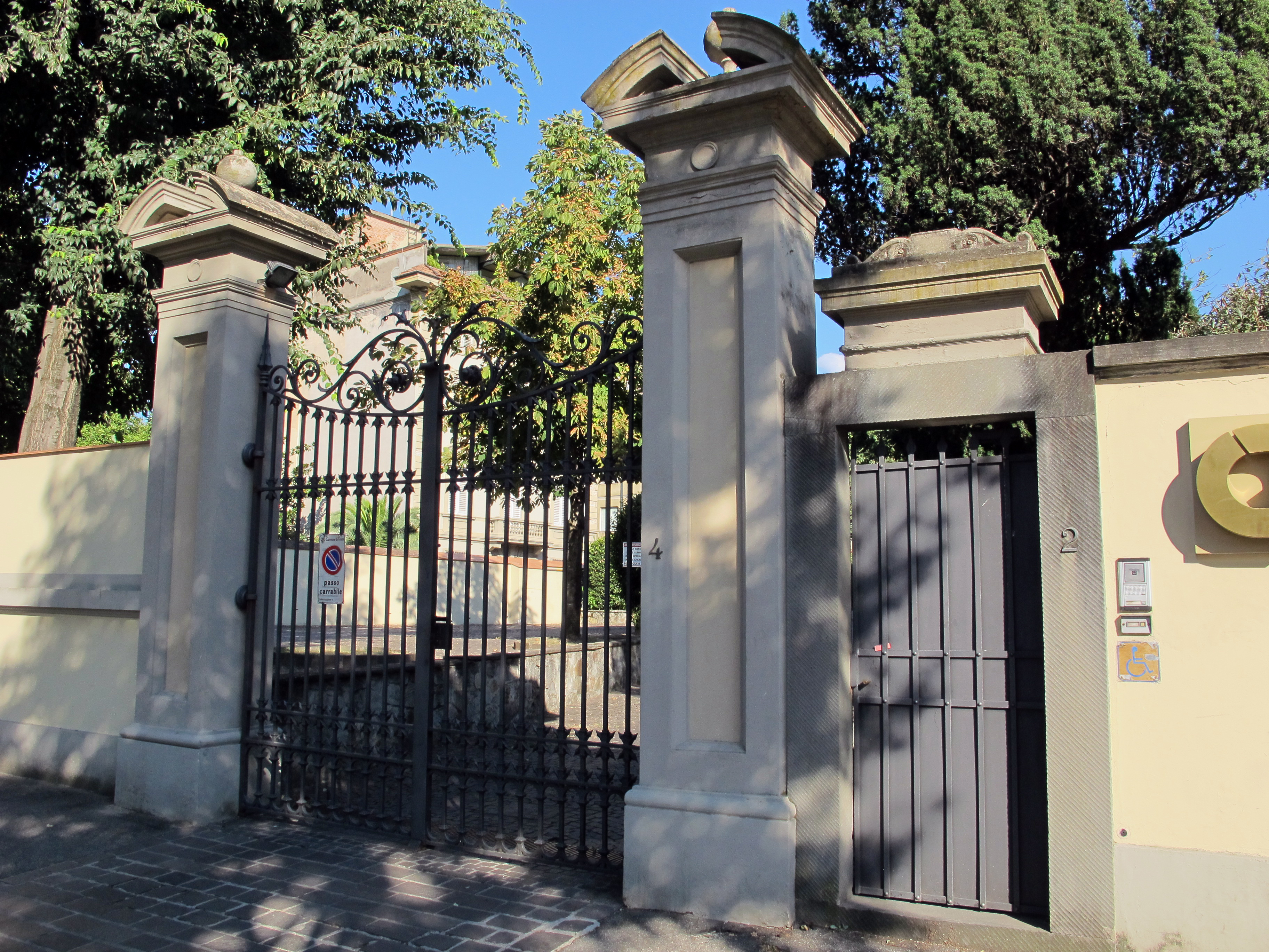 Viale Antonio Gramsci, Firenze